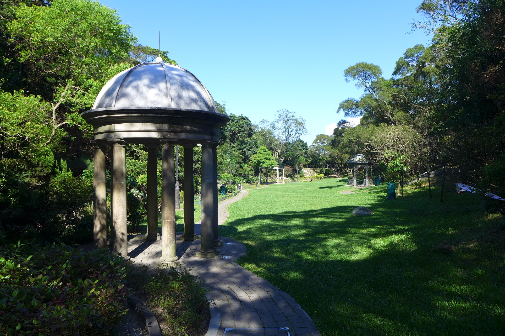 Victoria Peak Garden